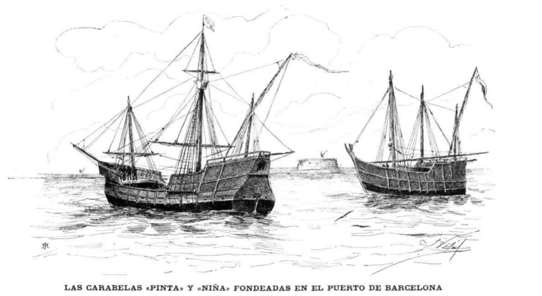 Las carabelas «Pinta» y «Niña» fondeadas en el Puerto de Barcelona.